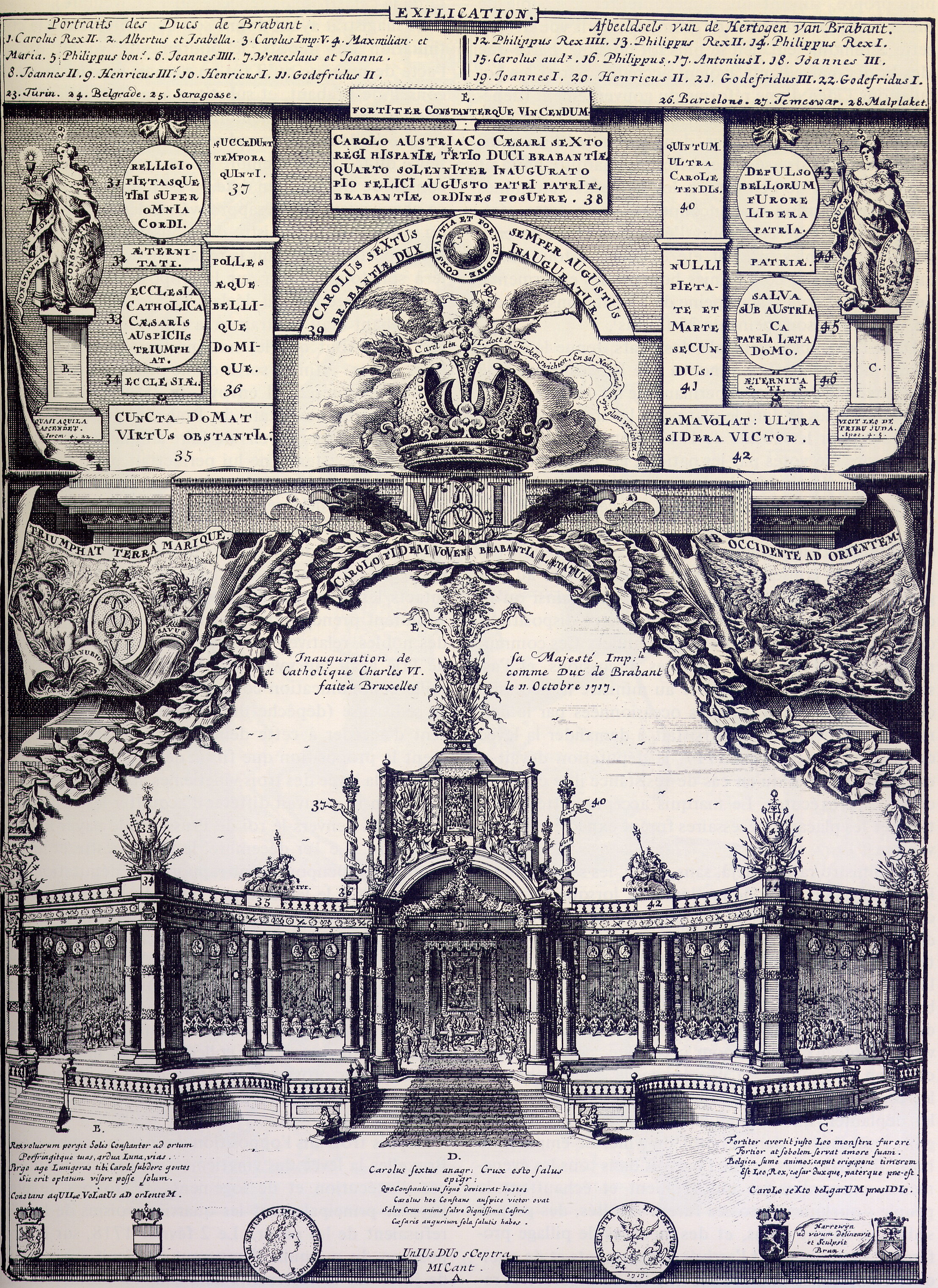 Gravure de Jacques Harrewijn représentant le Theatrum Caesareum dressé à Bruxelles en 1717 pour l'inauguration de Charles VI comme duc de Brabant, dessiné d'après nature et gravé par Jacques Harrewijn et reproduisant les chronogrammes donnant tous la date 1717 et les poésies latines de Petrus Vander Borcht